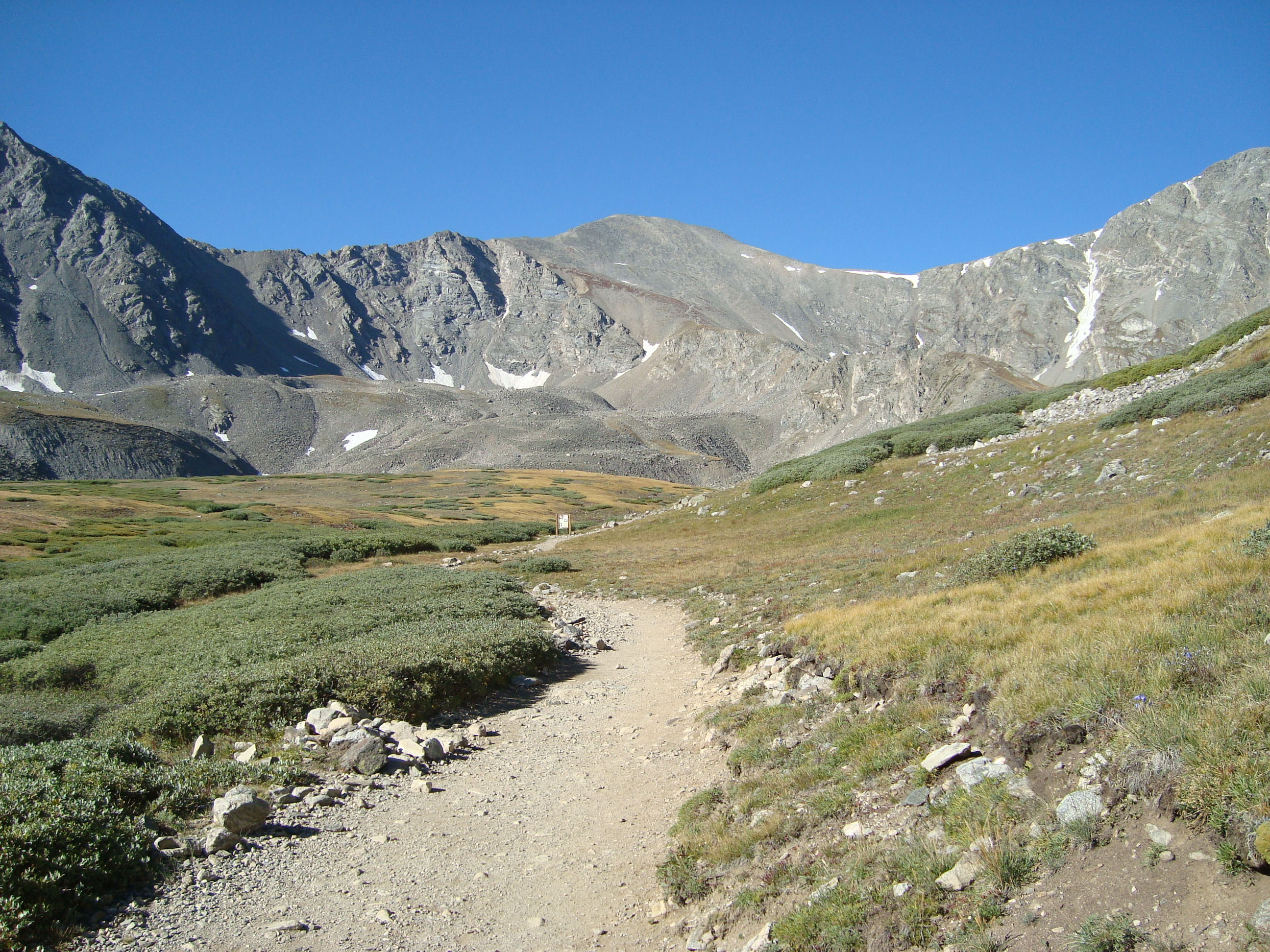 Grays Peak in the middle and Trail